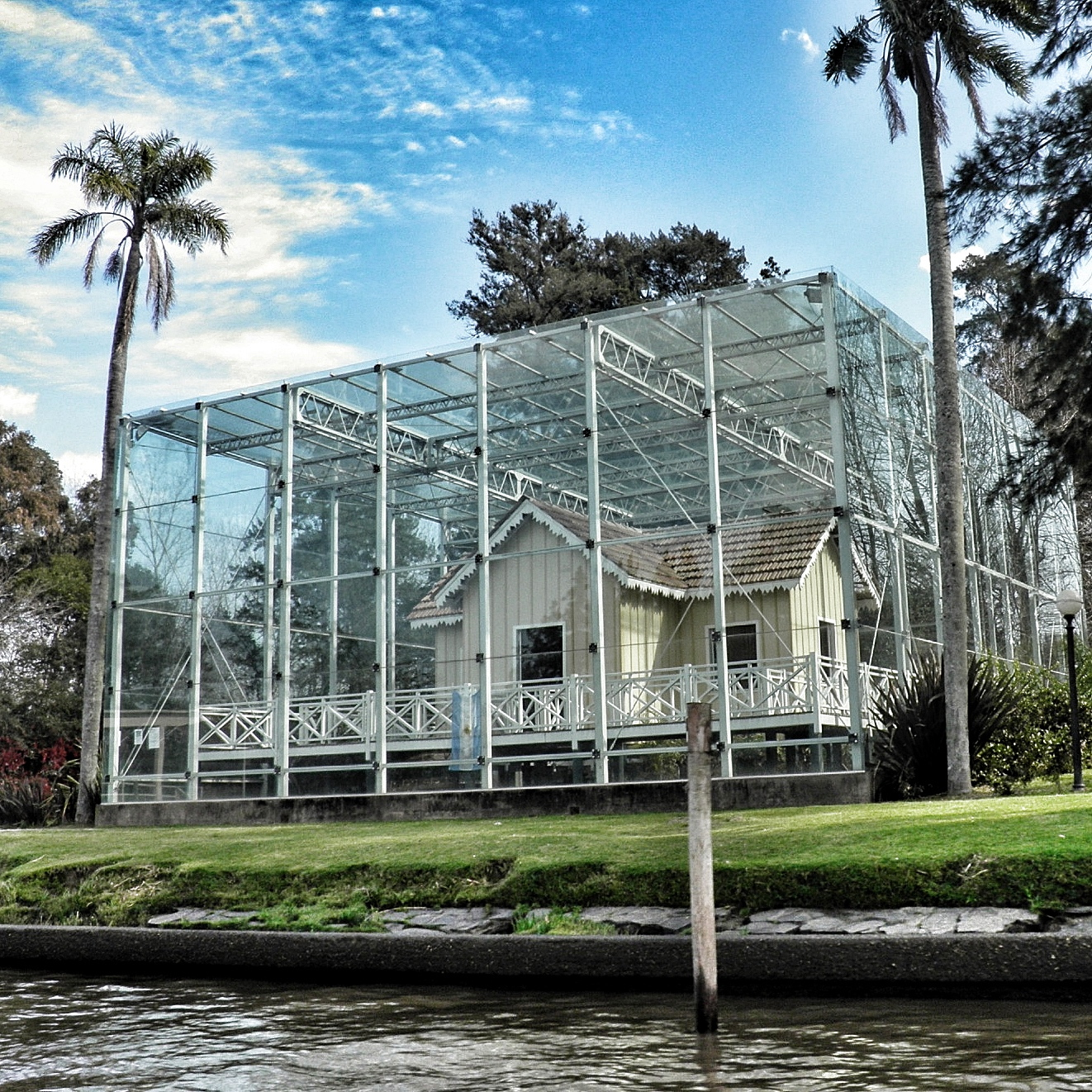 Casa de Domingo Faustino Sarmiento junto al Paraná